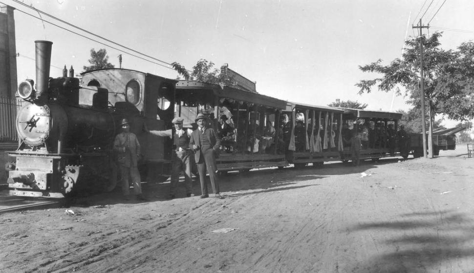 Trenes y Tranvías de Tucumán